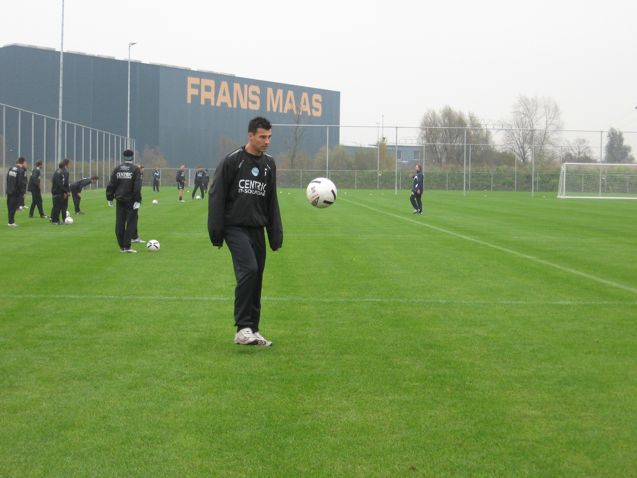 FC Groningen-speler Antoine van der Linden